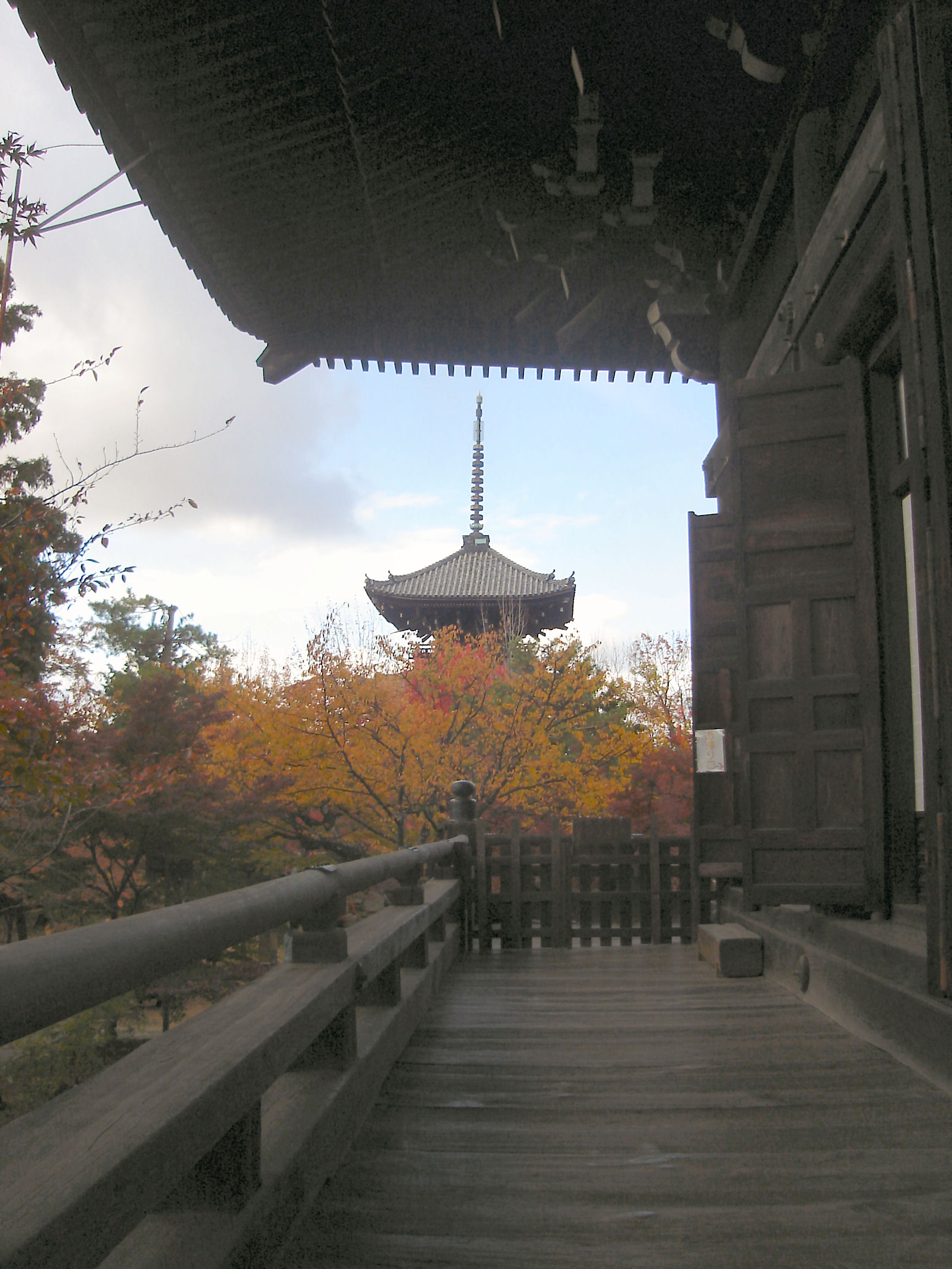 Shinnyo-do , kyoto japan